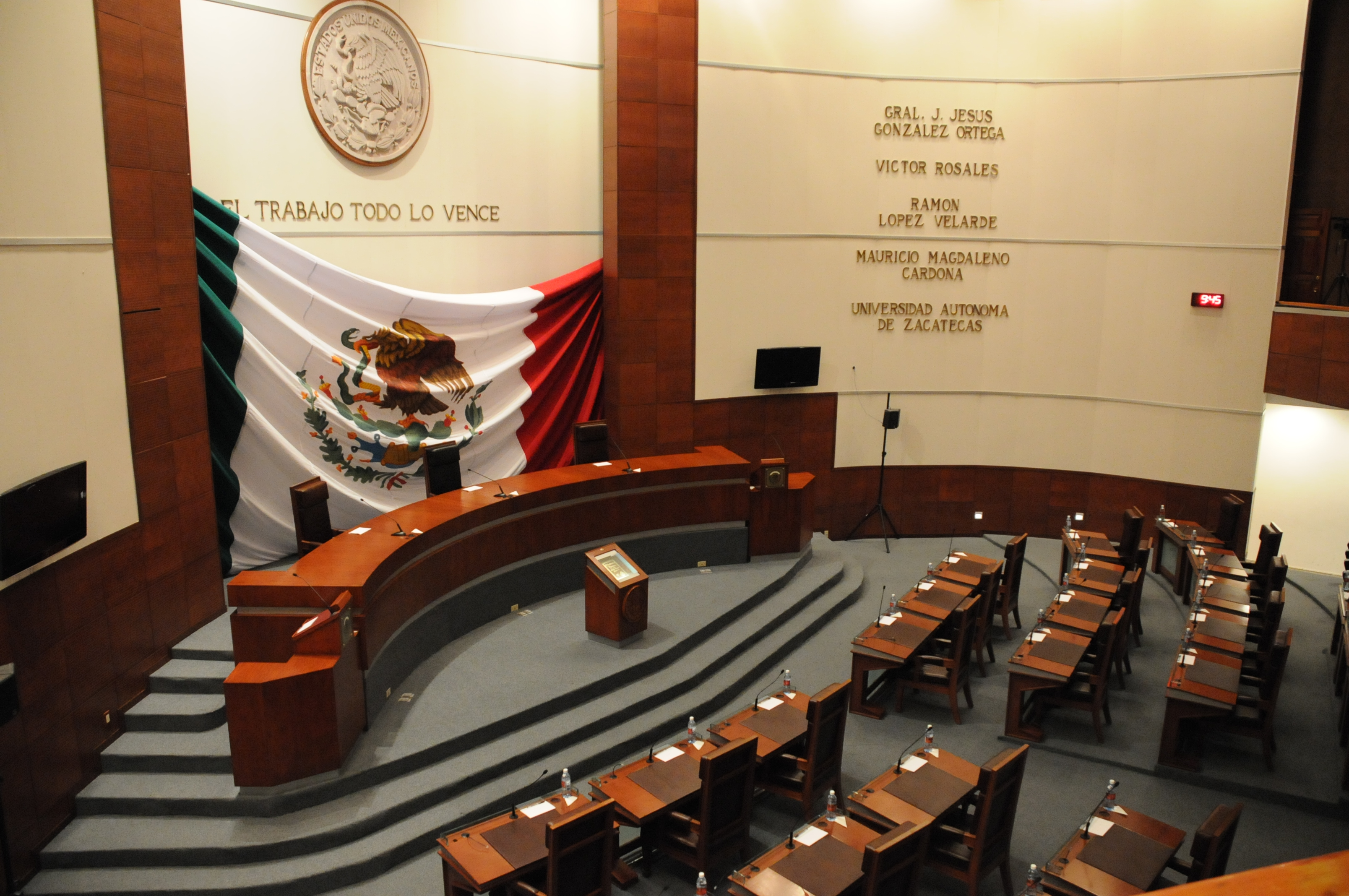 Sala de Sesiones